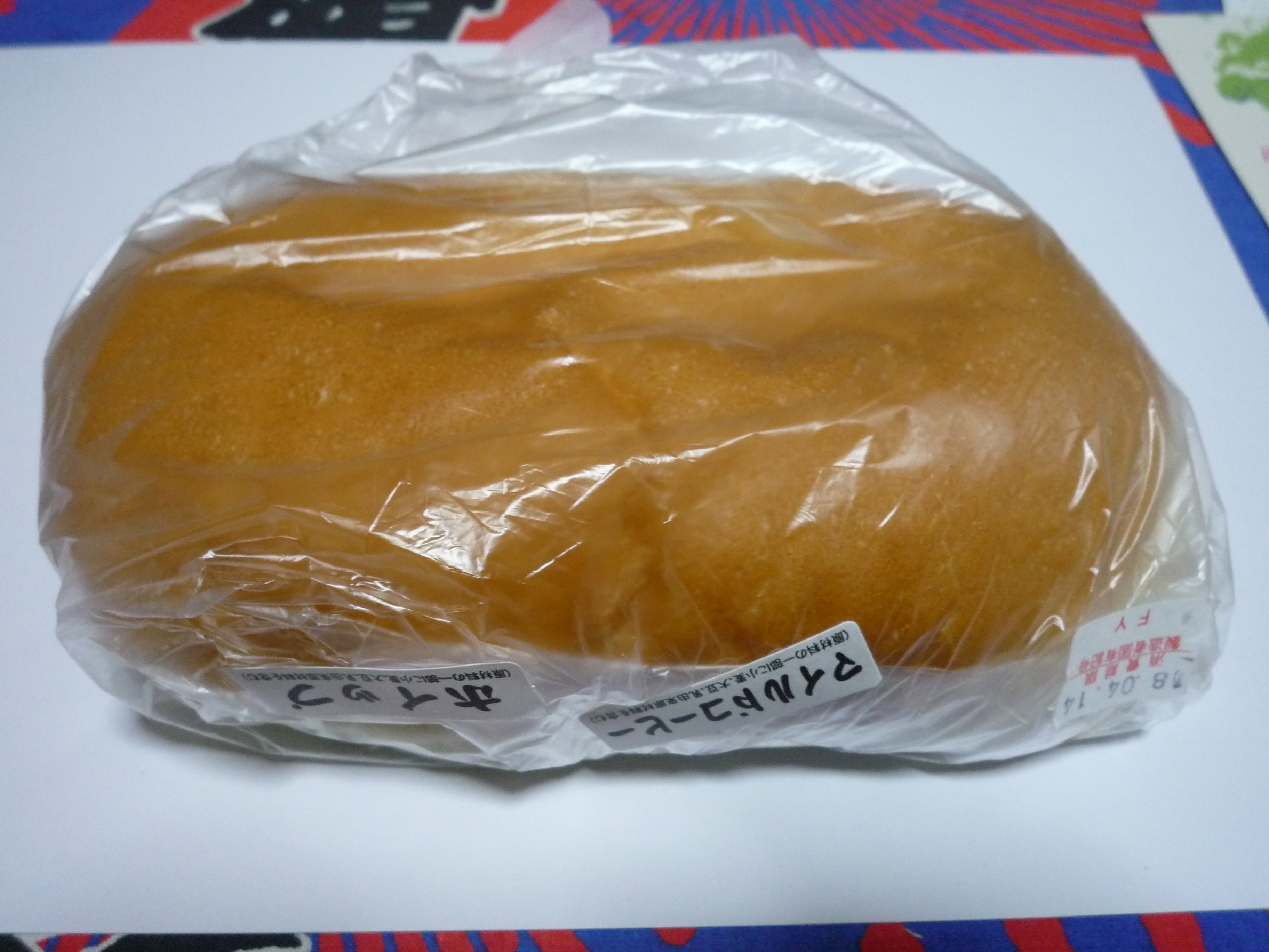 2種類のクリームが中にはいっている。このパンの中身は｢マイルドコーヒー｣と｢ホイップ｣